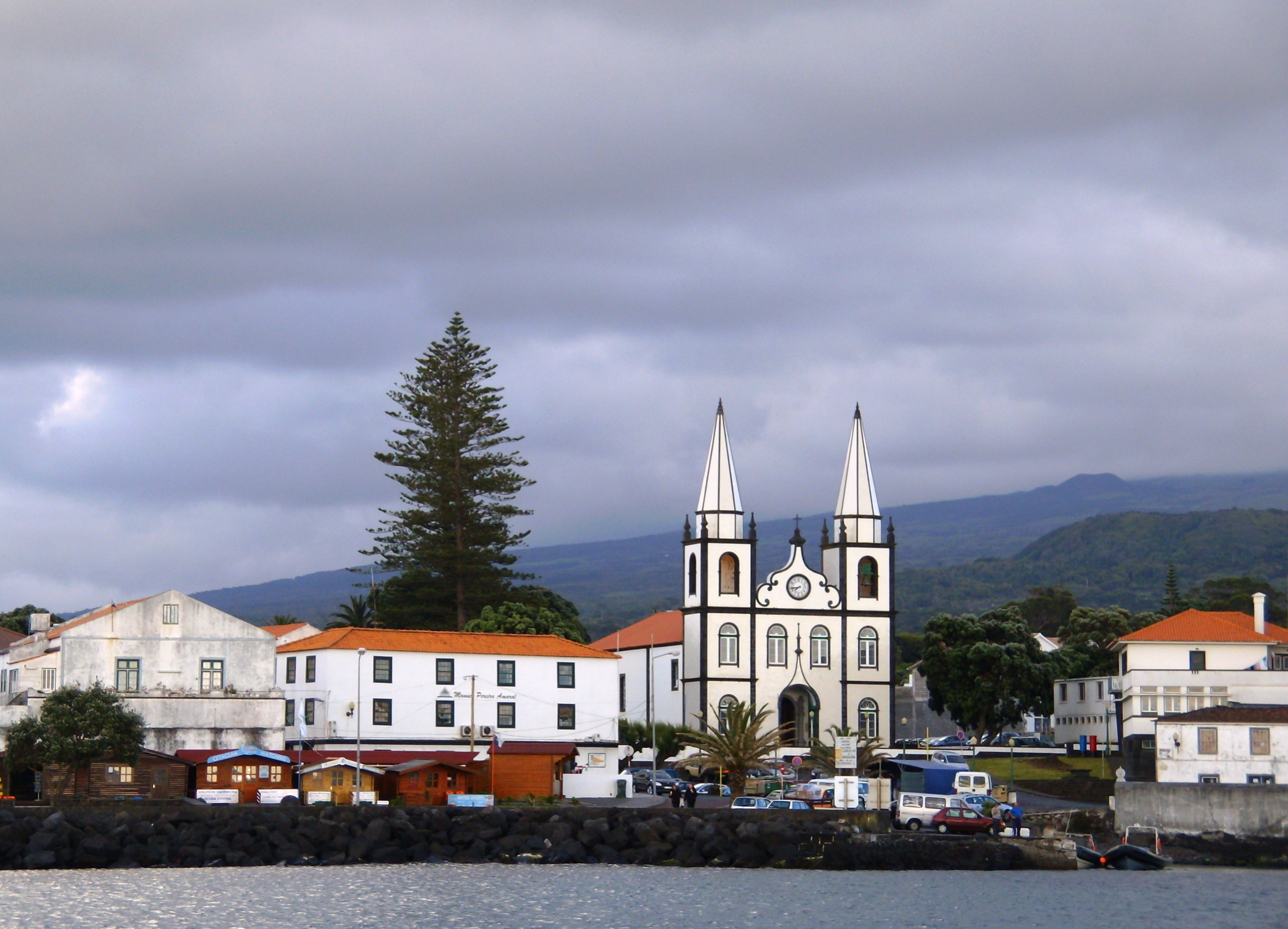 Madalena, ilha do Pico, Açores.